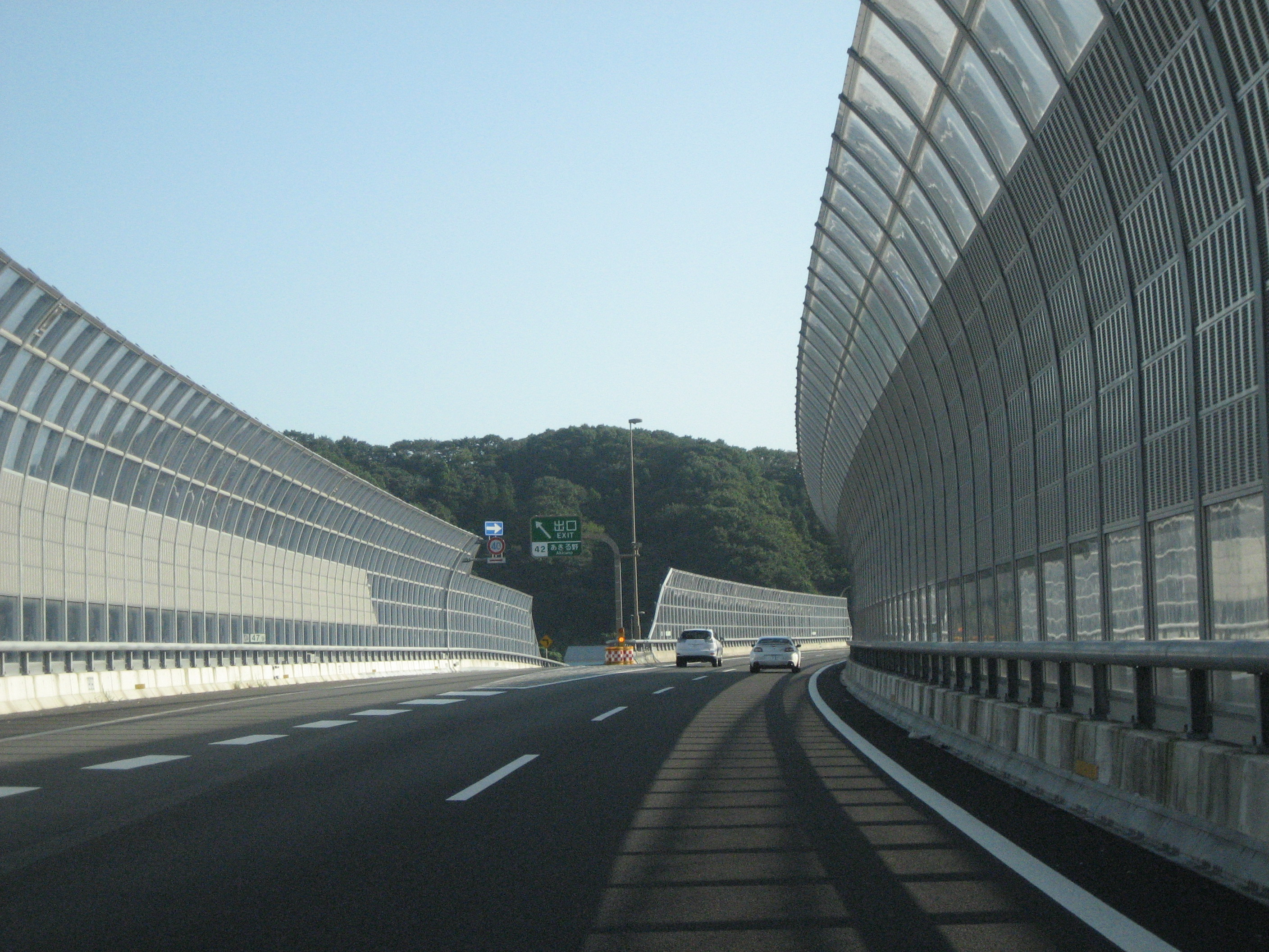 圏央道あきる野インター出口付近